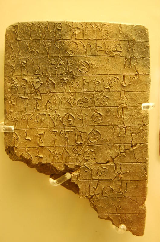 Morceau d'argile sur lequel est inscrit un texte utilisant l'écriture Linéaire B. Musée archéologique de Mycènes